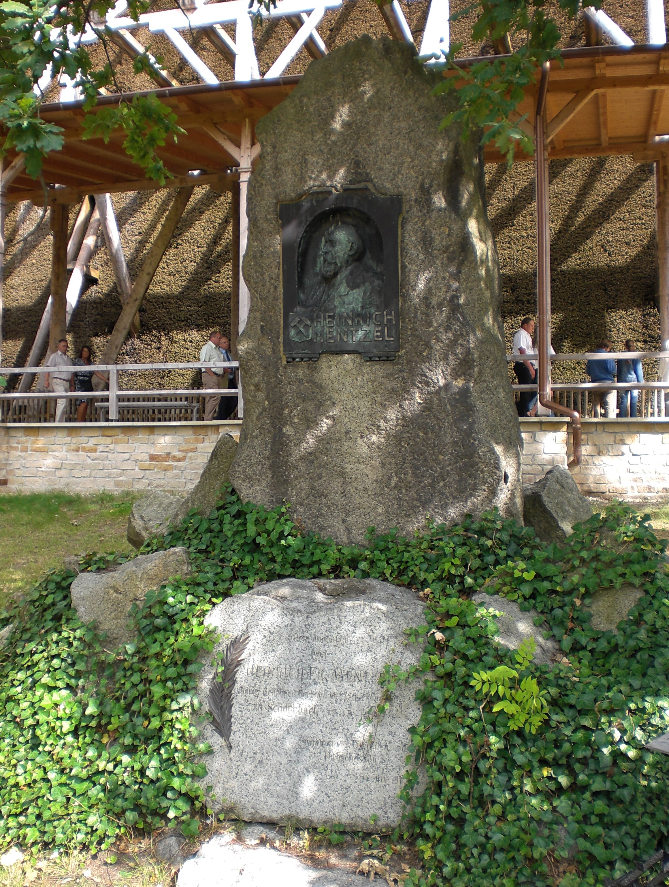 Gedenkstein für Heinrich Mentzel, aufgestellt 1902, Kurpark in Schönebeck